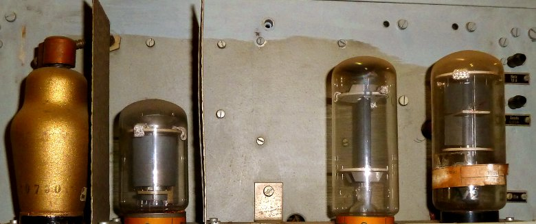 HF Drahtfunk Breibandverstärker mit Röhren sk 562